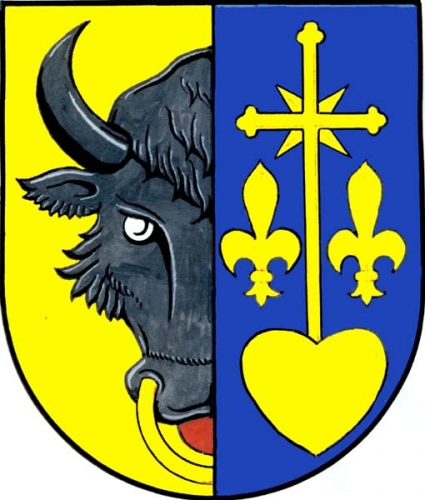 znak, Rozsochy, okres Žďár nad Sázavou